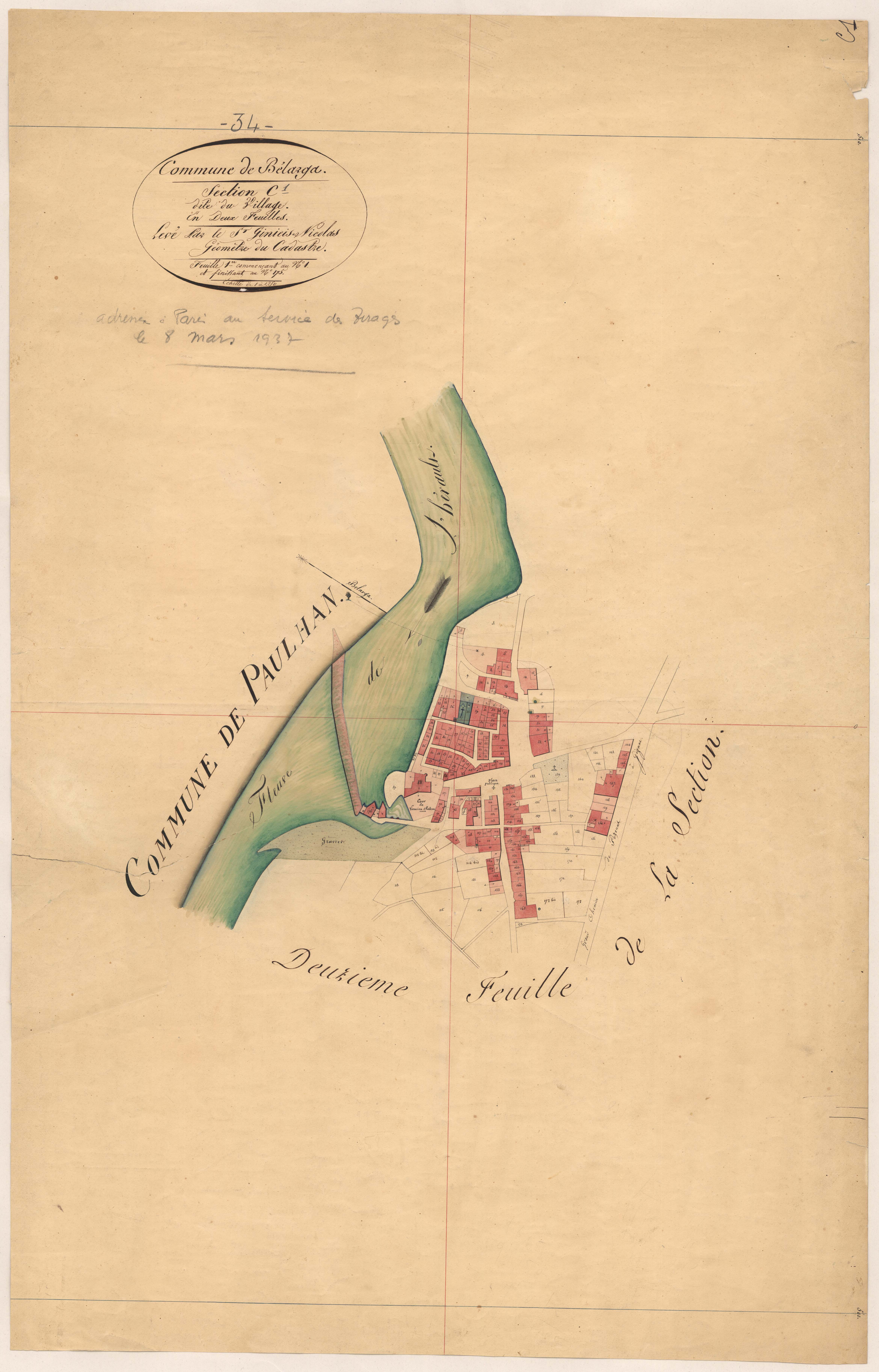 Bélarga. - Cadastre napoléonien : plan de la section C1 du Village